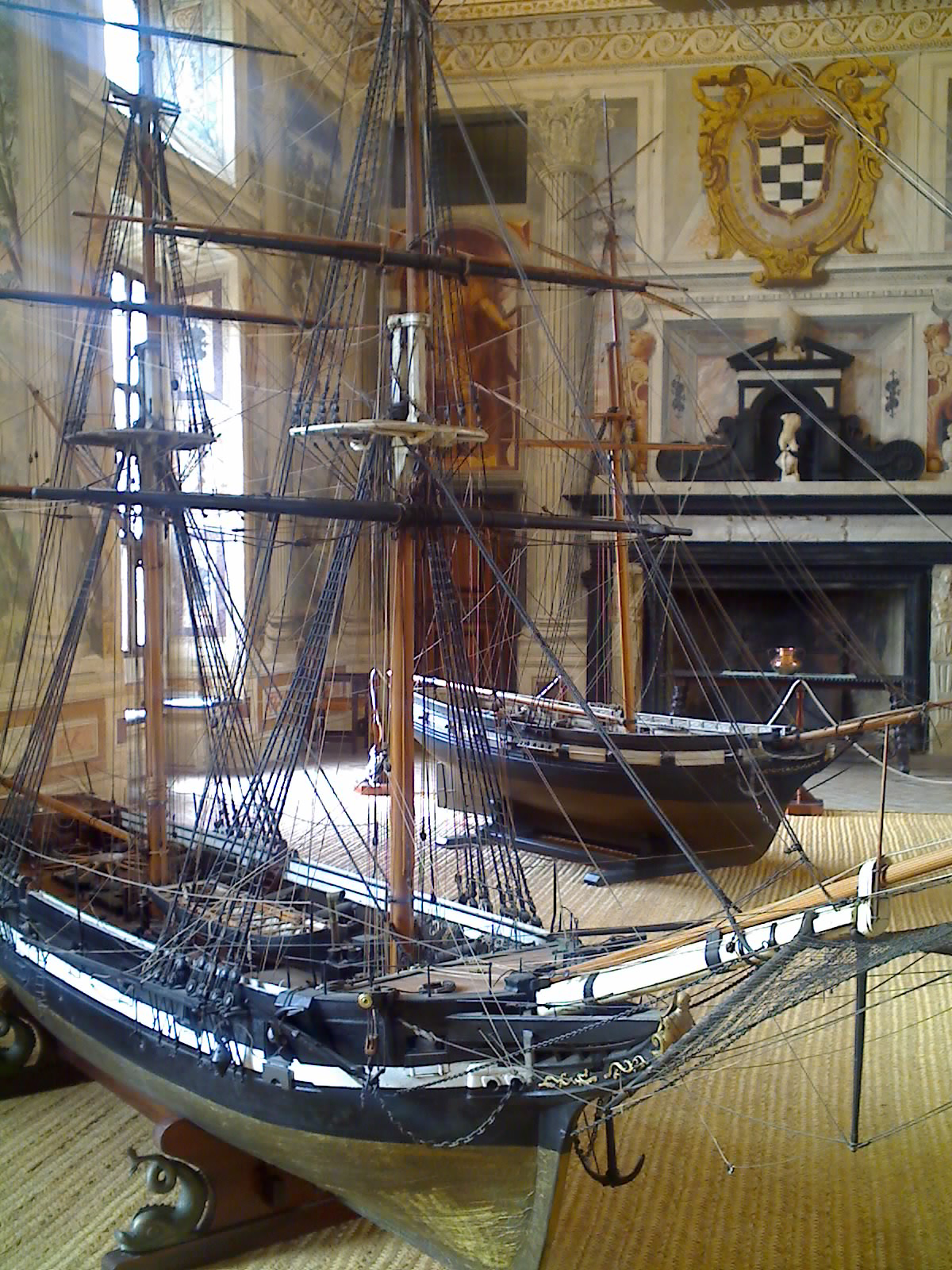 Maquetas de barcos en el Palacio del Marqués de Santa Cruz en el Viso del Marqués (Provincia de Ciudad Real, España).